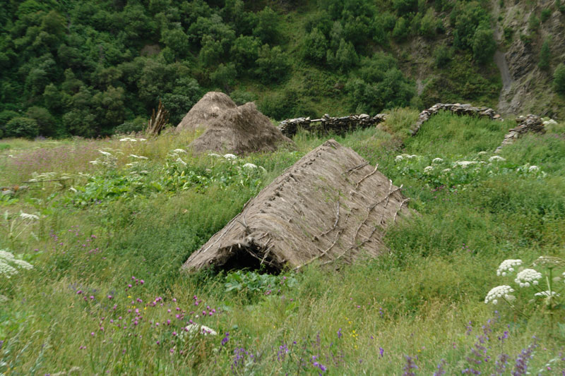 Georgia, Khevsureti